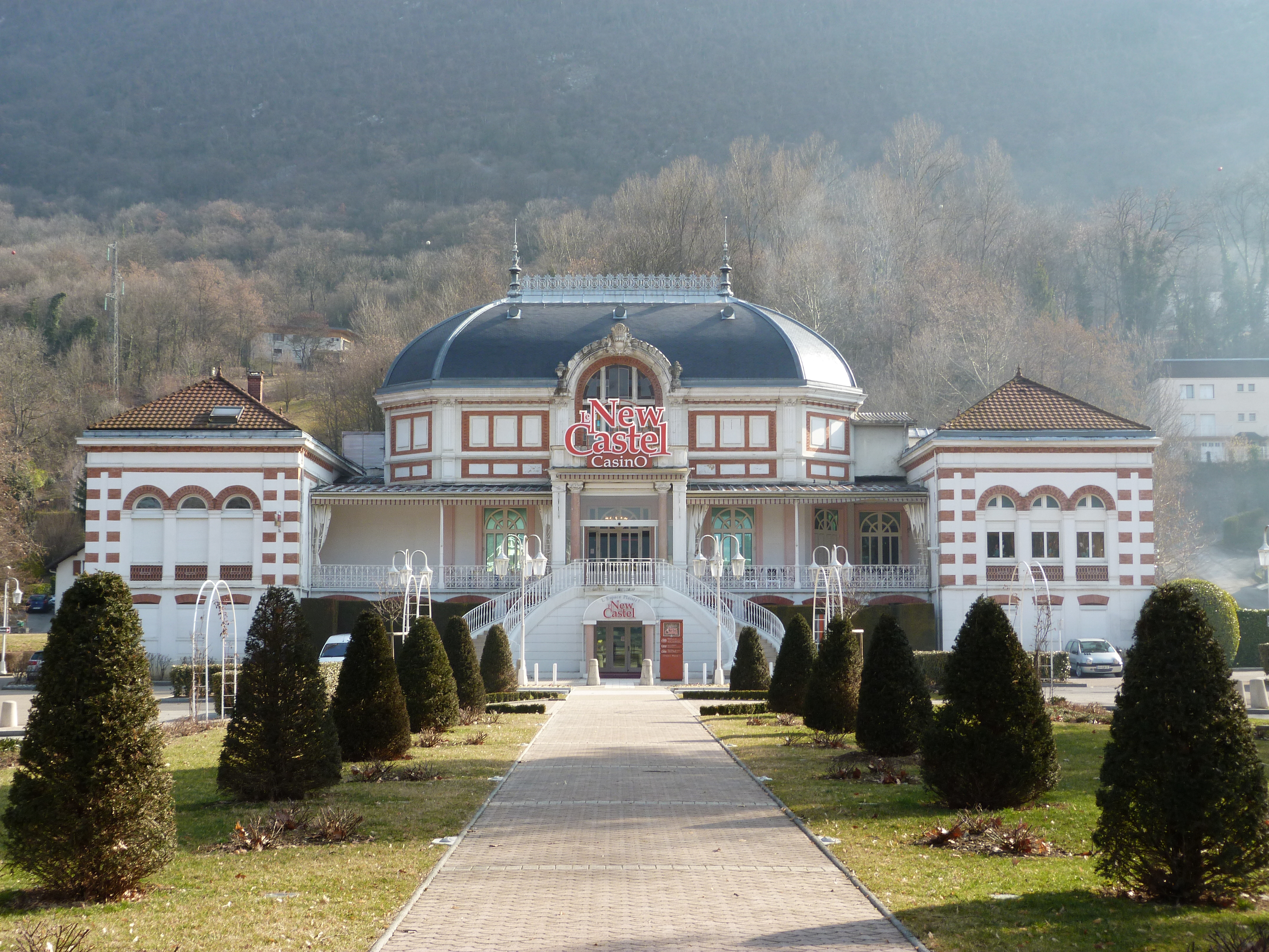 L'allée du casino de Challes-les-Eaux au petit matin